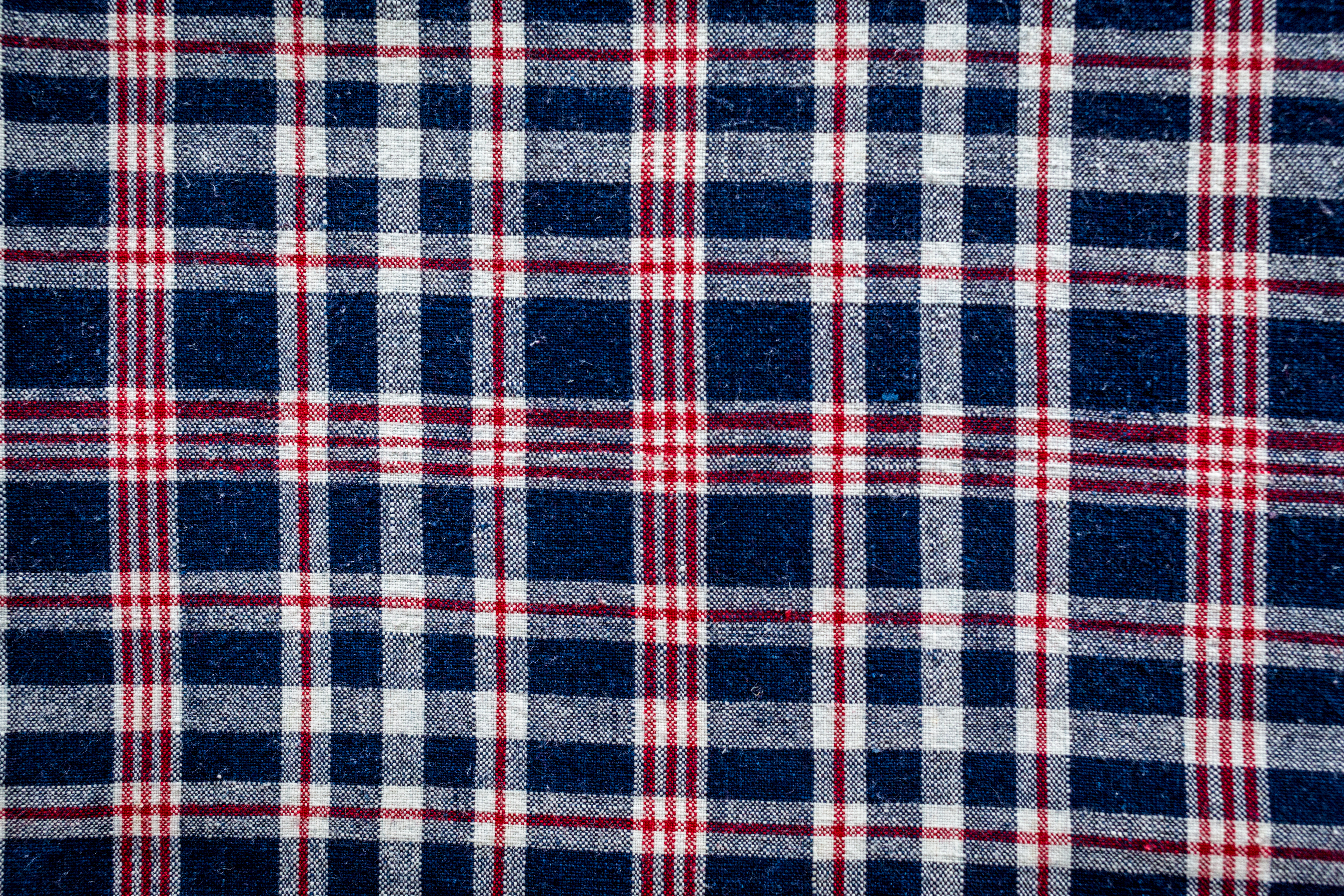 Collection de kelsch du Musée alsacien de Strasbourg. Motif associant les fils bleus, rouges et blancs sans intention patriotique.